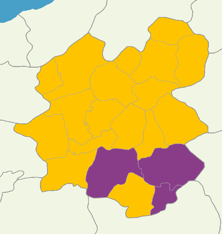 Erzurum'da 2014 Türkiye cumhurbaşkanlığı seçimi